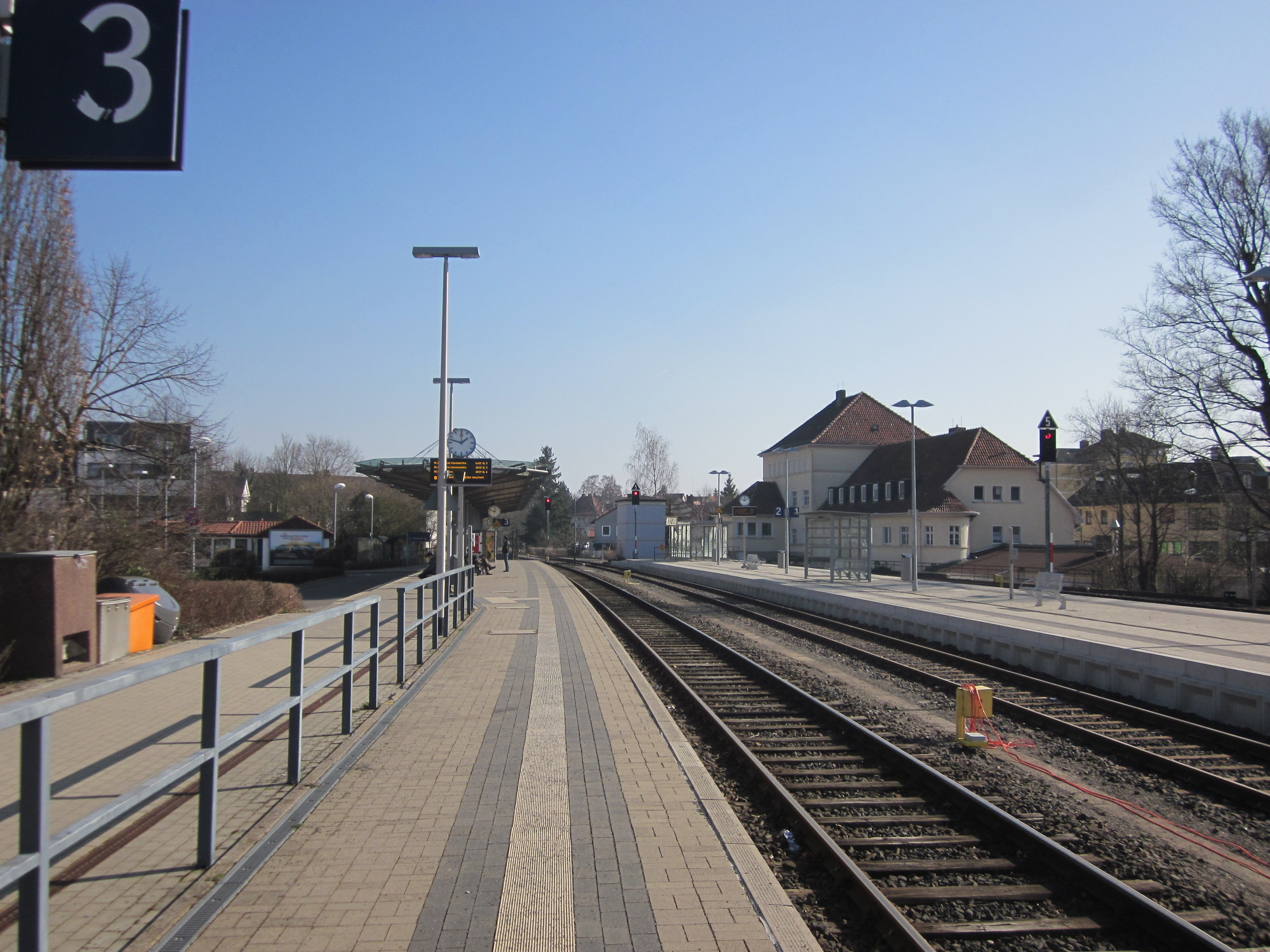 Gleisseite des Bahnhofes Korbach